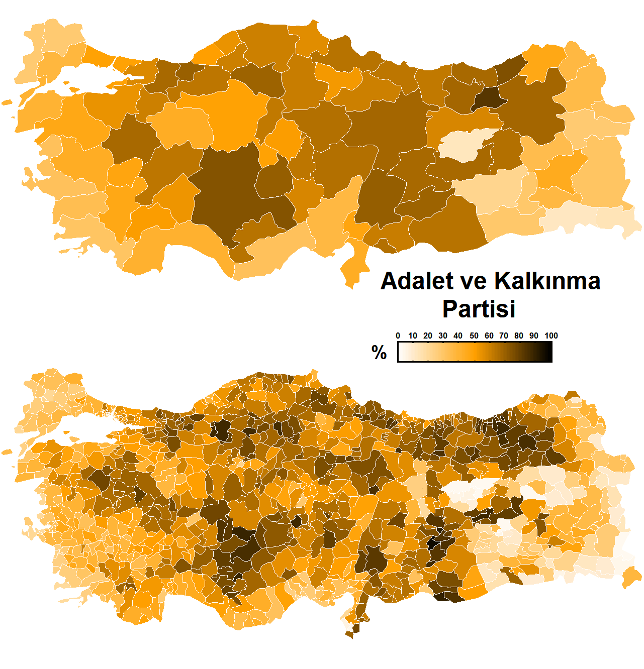 Adalet ve Kalkınma Partisi'nin il ve ilçe bazında oy oranlarının yoğunluğunu gösteren harita